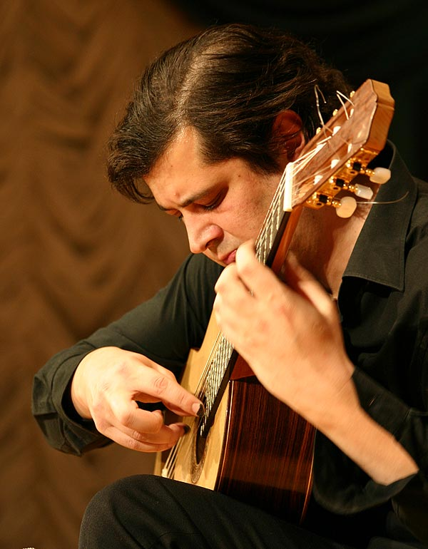 Алексей Викторович Зимаков — российский гитарист